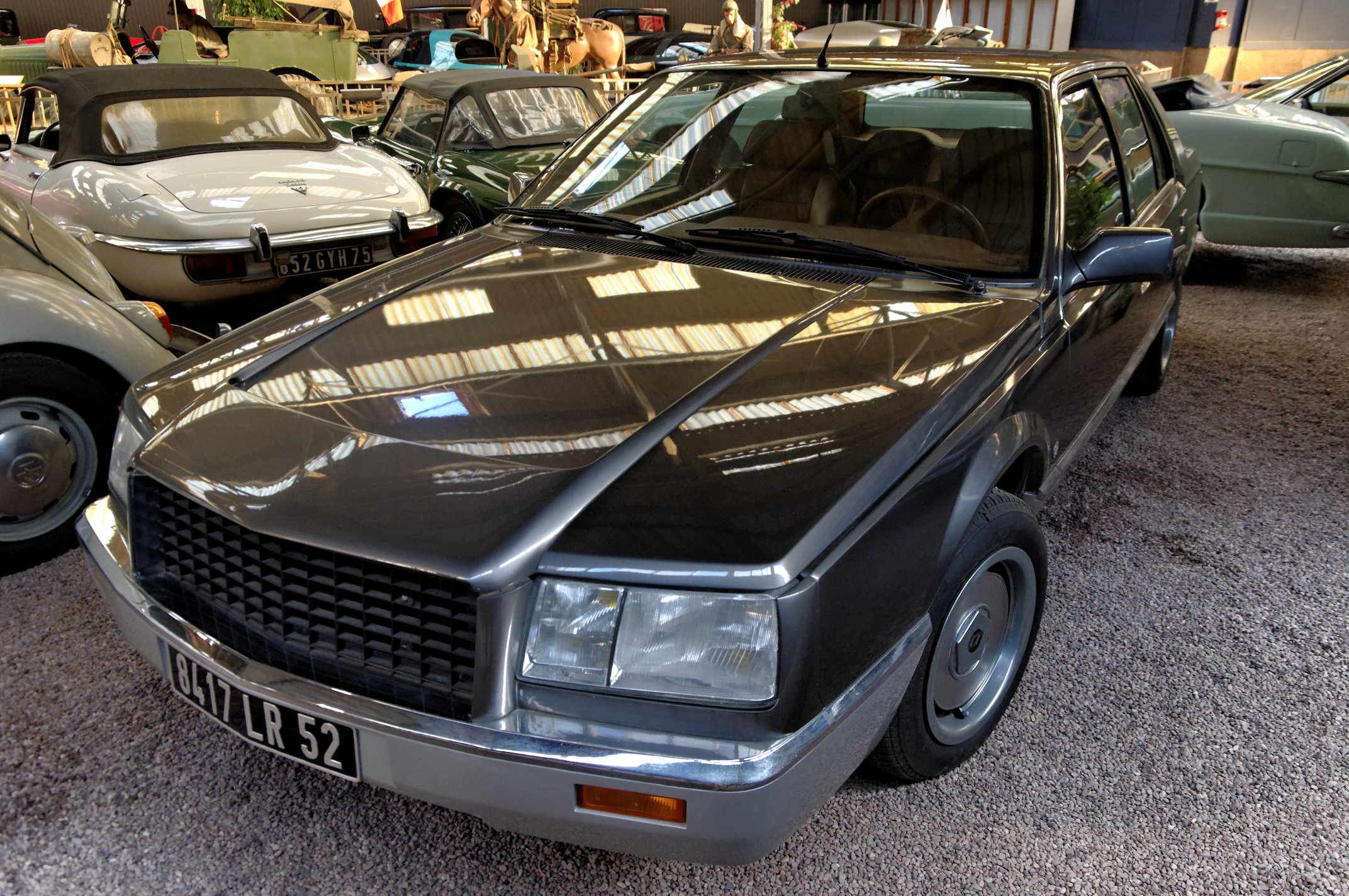 Renault R 25 (1985), Berline, modèle spécial carrossé par Franco Sbarro, 6 cyl. en V PRV, 2664 cm3, 14 cv fiscaux, vitesse max. 200 km/h(Musée Automobile Reims Champagne, Reims, Marne, France)